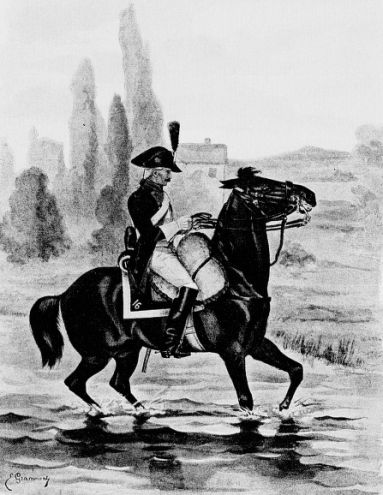 16e de cavalerie, 1795 Par E. Grammont, publié dans l' Historique du 25e régiment de dragons, 1665-1890, par le capitaine de Bourqueney